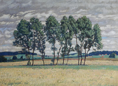 Baumgruppe in weiter Sommerlandschaft